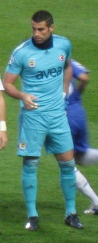 Volkan Demirel